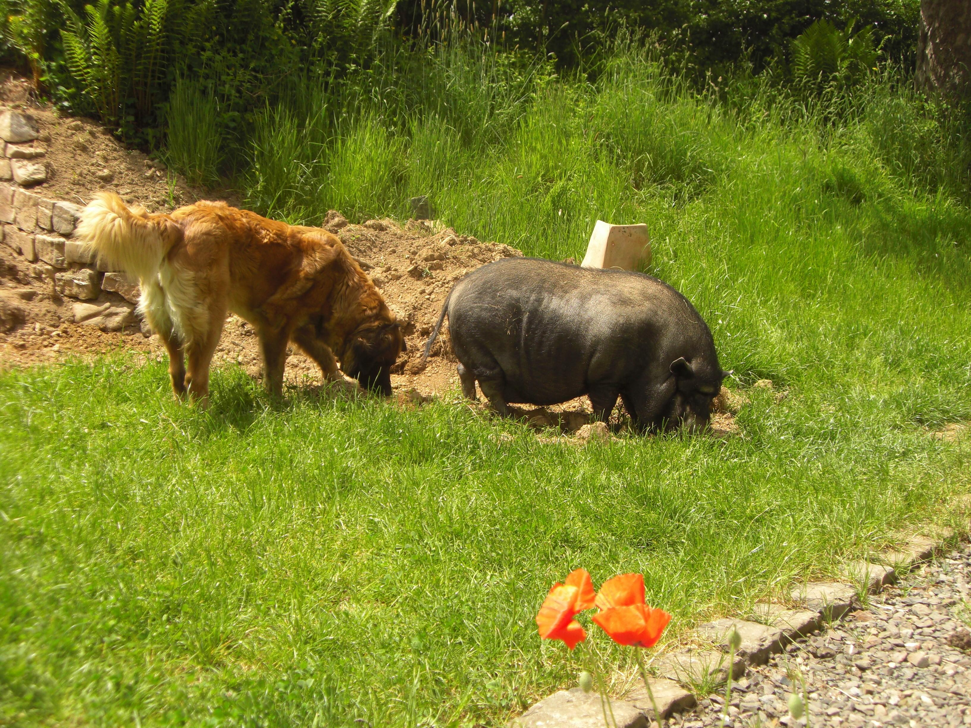 Hund und Göttinger Minischwein